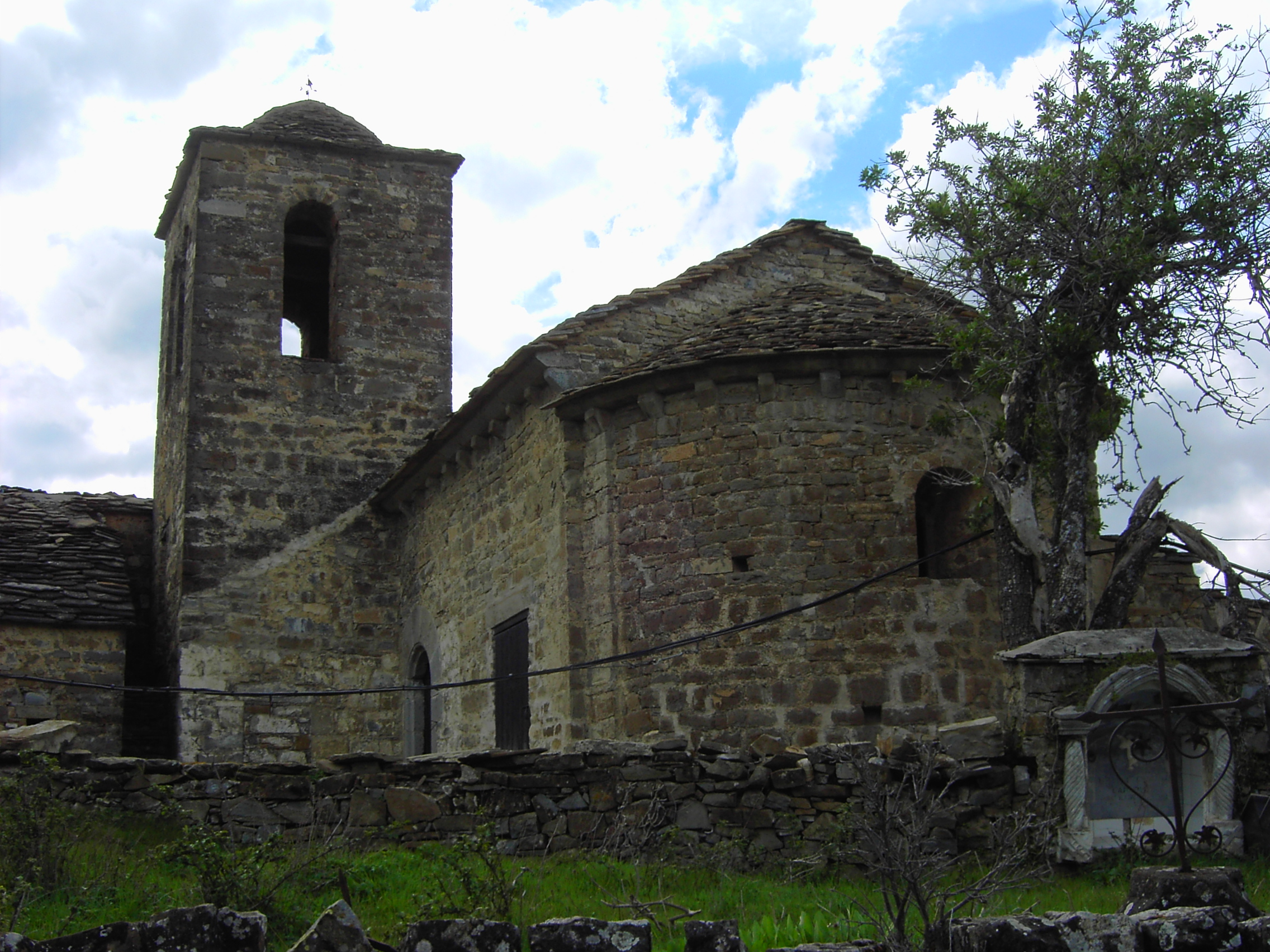 La antiquísima iglesia del despoblado de Moriello de Sampietro.